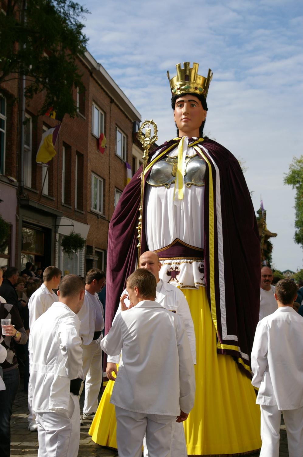 Melle Victoire, géant d'Ath, en 2008